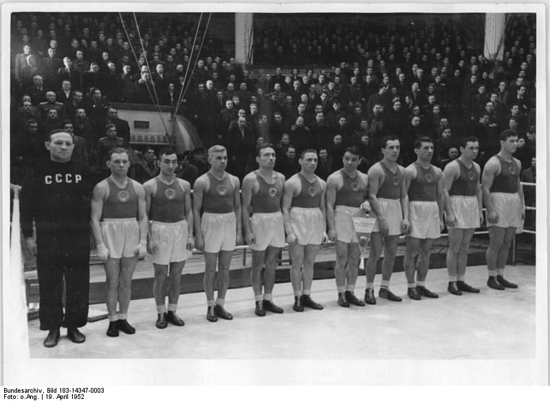 Moskau, Boxer der UdSSR Zentralbild XIII 6.5.1952 Internationales Länderturnier der Amateurboxer in Moskau vom 7.-15.März 1952. Im Moskauer Staatlichen Zirkus fanden die internationalen Freundschaftswettkämpfe von Amateurboxern aus 7 Ländern statt. Im Ring trafen sich die Mannschaften der UdSSR, der CSR, Ungarn, Bulgarien, Polens, Rumäniens und der Deutschen Demokratischen Republik. UBz: Die Boxmannschaft der UdSSR vor Beginn der Kämpfe mit ihrem Trainer Jewgeni Ogurenko (links)